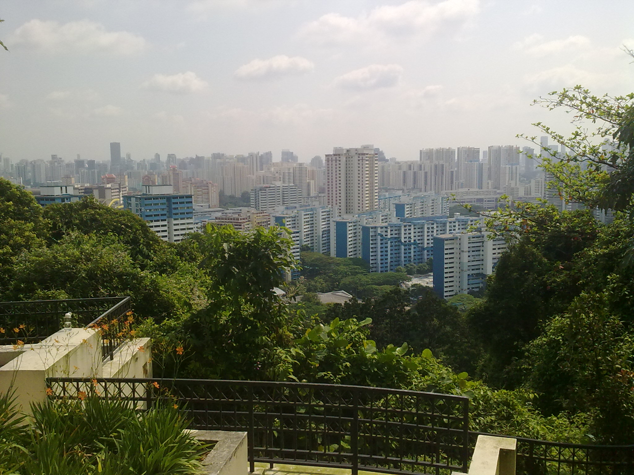 Singapore